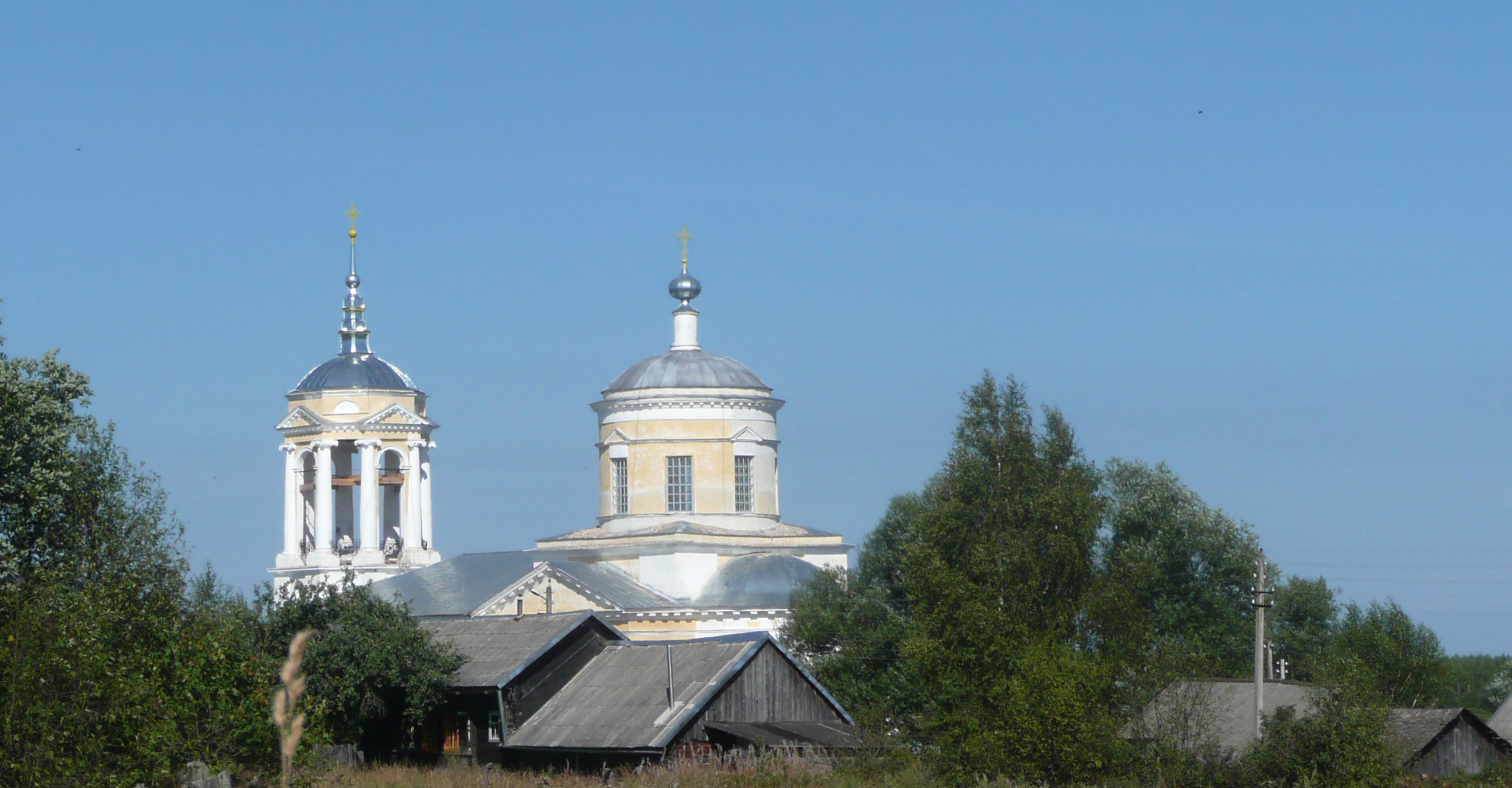 Церковь в Никольском